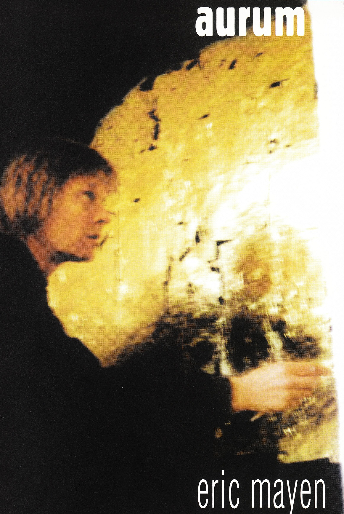 Eric Mayen podczas złocenia niszy "niger et aurum", okładka katalogu "Aurum"